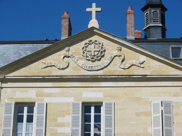 Le fronton à l'entrée de l'espace Saint-Gildard, où vécut Sainte-Bernadette (Bernadette Soubirous), à Nevers.